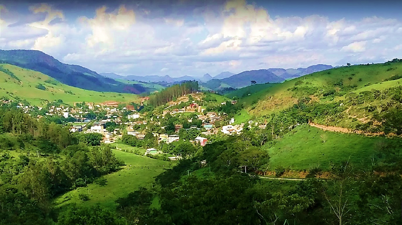 Raposo, vista obtida do Mirante do Cristo.